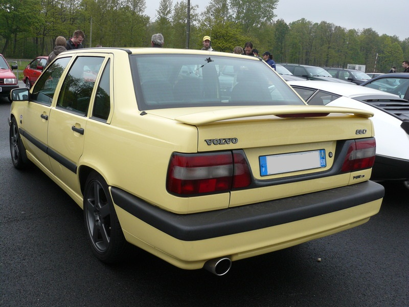 Français cadien: Montlhery Avril 2012